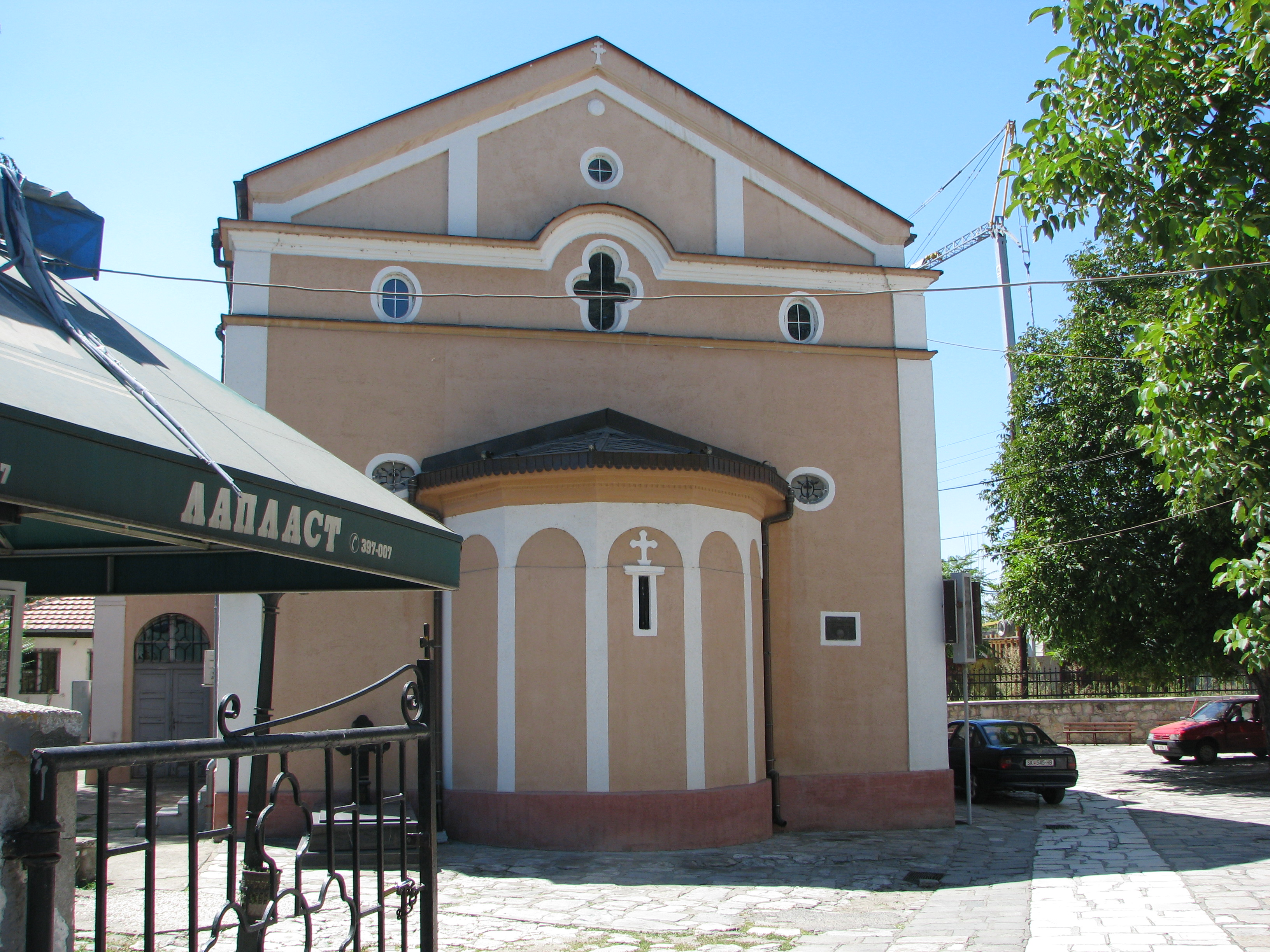 Църквата „Свети Димитър“ в Скопие, Република Македония.